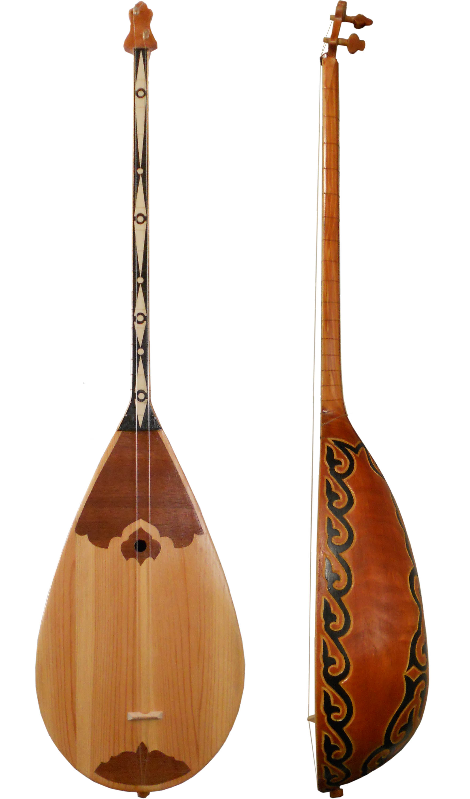 ドンブラ。カザフスタン製。